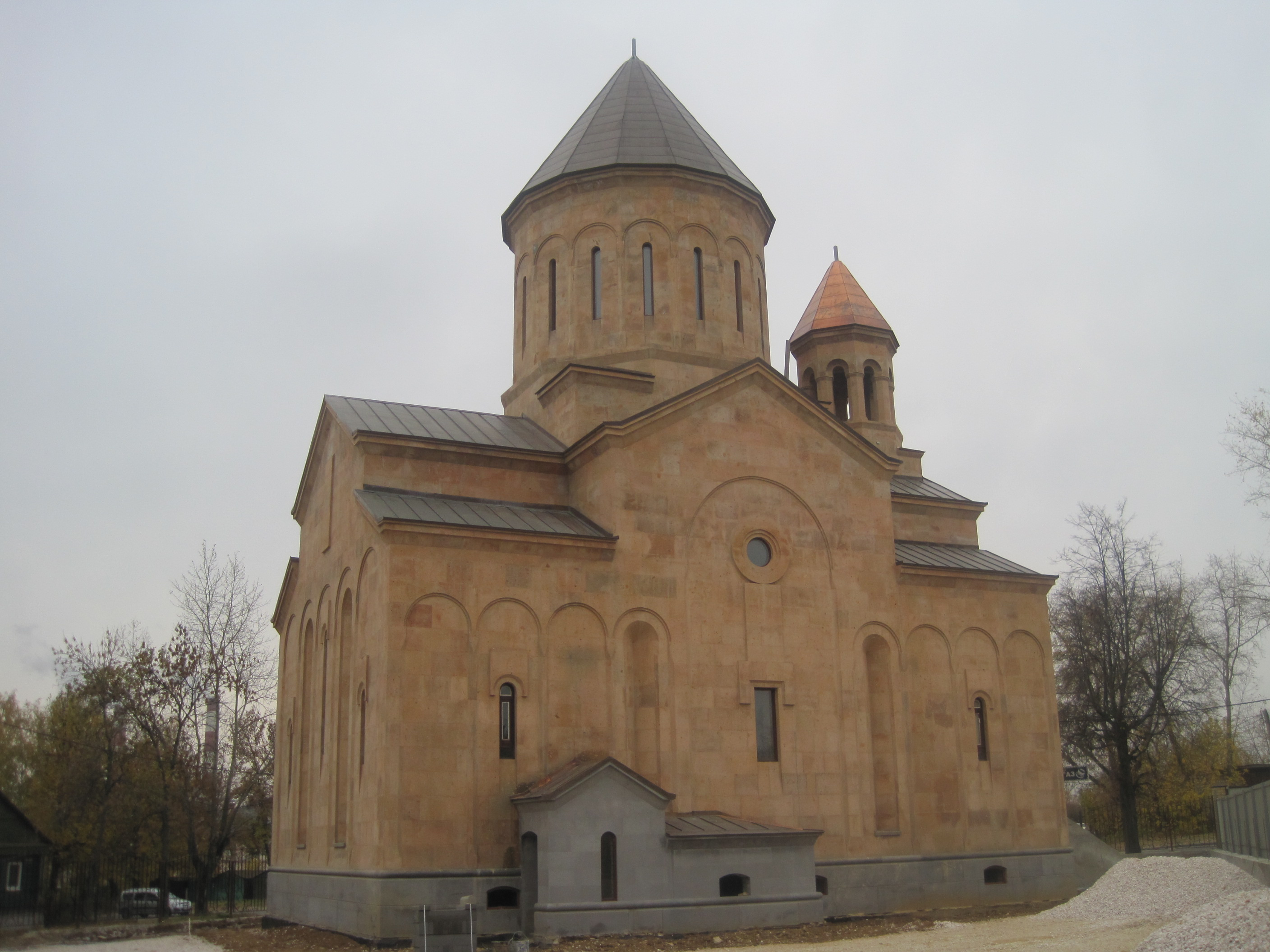 église construite en 2014 suivant les plans traditionnels des églises arméniennes